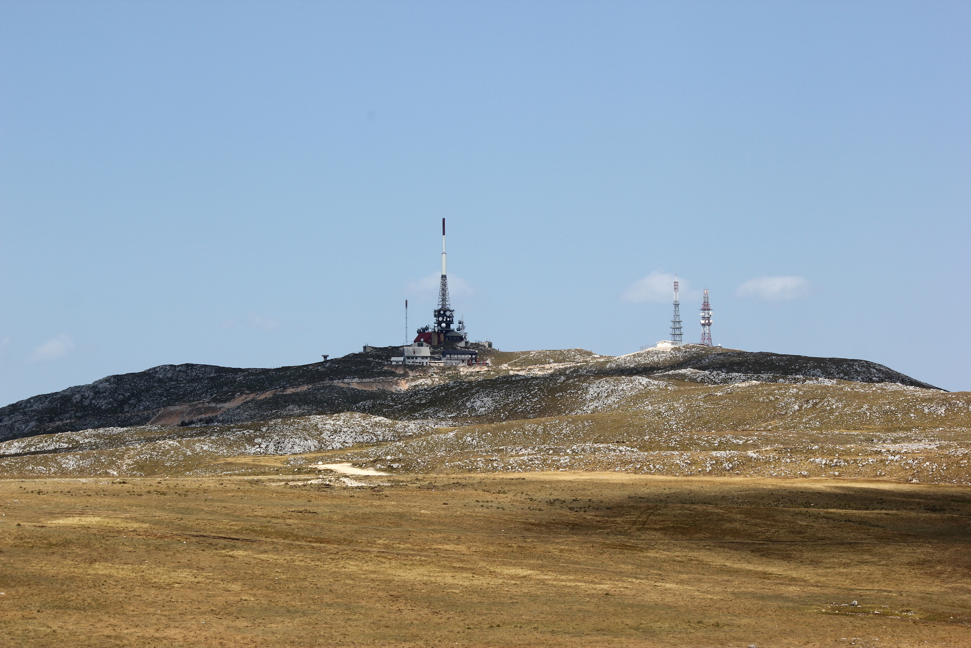 Die Sendeanlagen von Fernsehen und Radio auf dem Vlašić bei Turbe (Bosnien und Herzegowina).